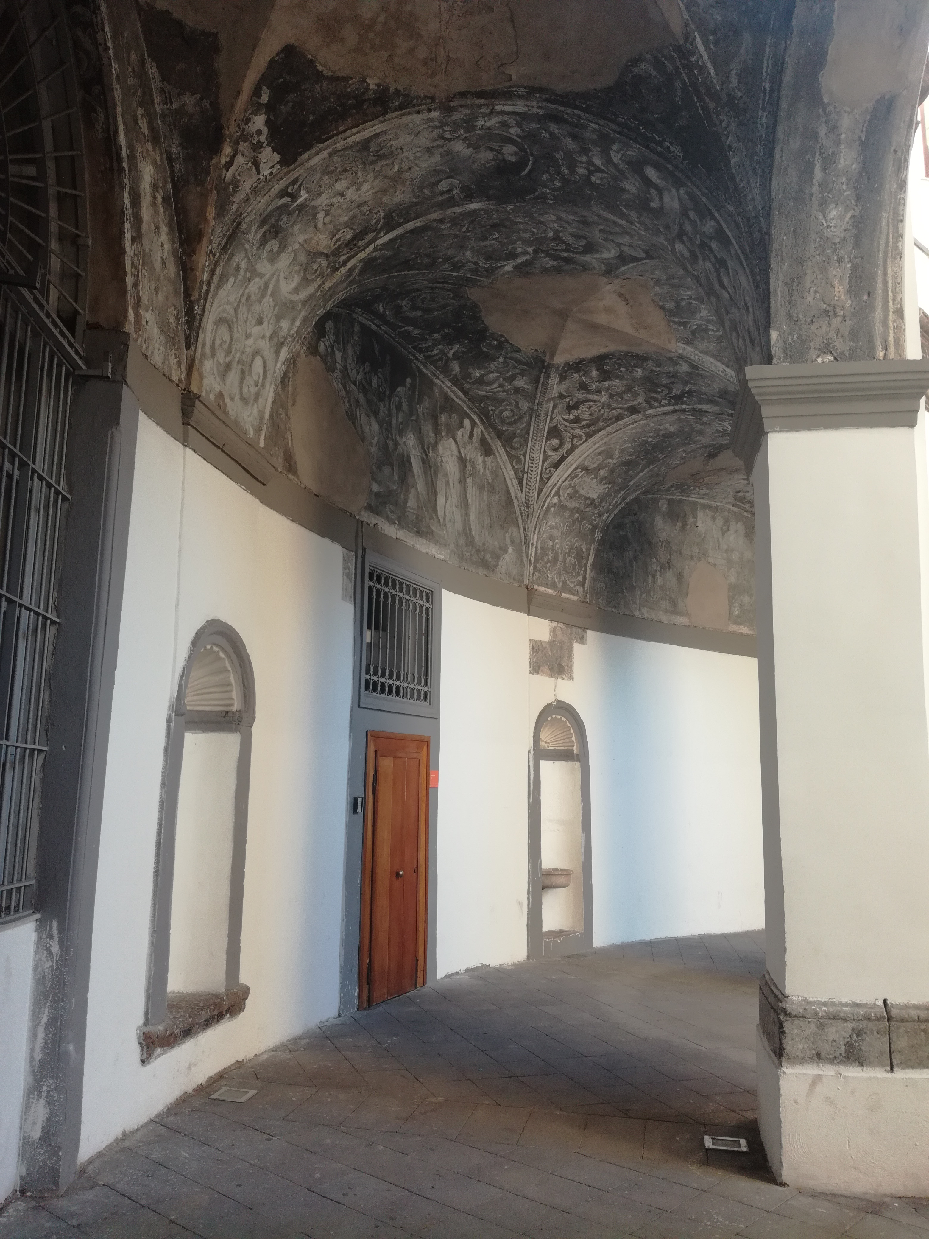 Basilica di Santa Maria della Sanità (Napoli)